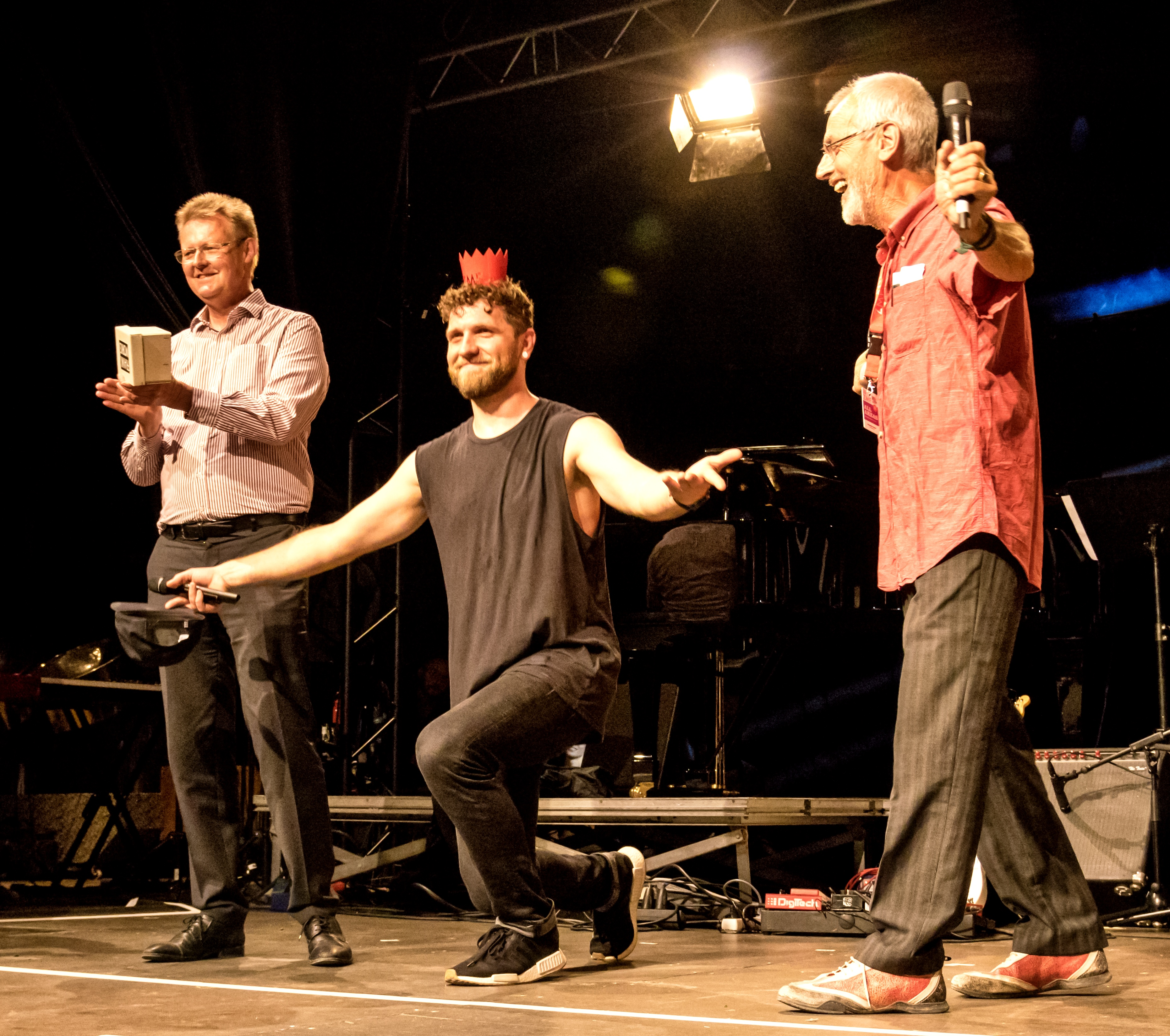 Bilder vom Zelt Musik Festival 2017 in Freiburg im Breisgau Die Gala am 11. Juli 2017 Der Preisträger 2017 Peter Stöcklin